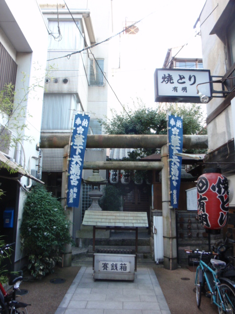 香川県高松市にある華下天満宮。